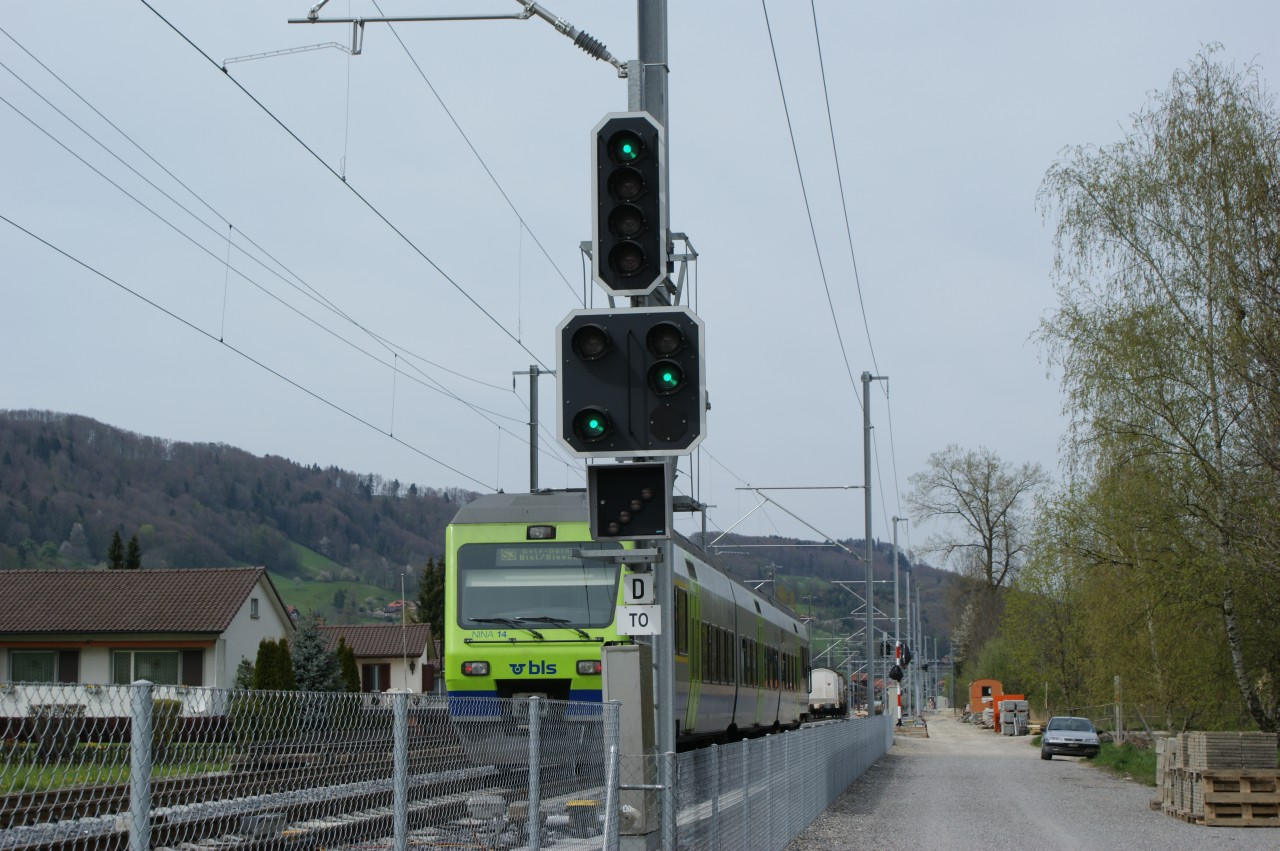 Einfahrsignal mit Ausfahrvorsignal Toffen von Kaufdorf her, NINA 014 passiert soeben das Signal, das Ein- und Ausfahrt offen zeigt.